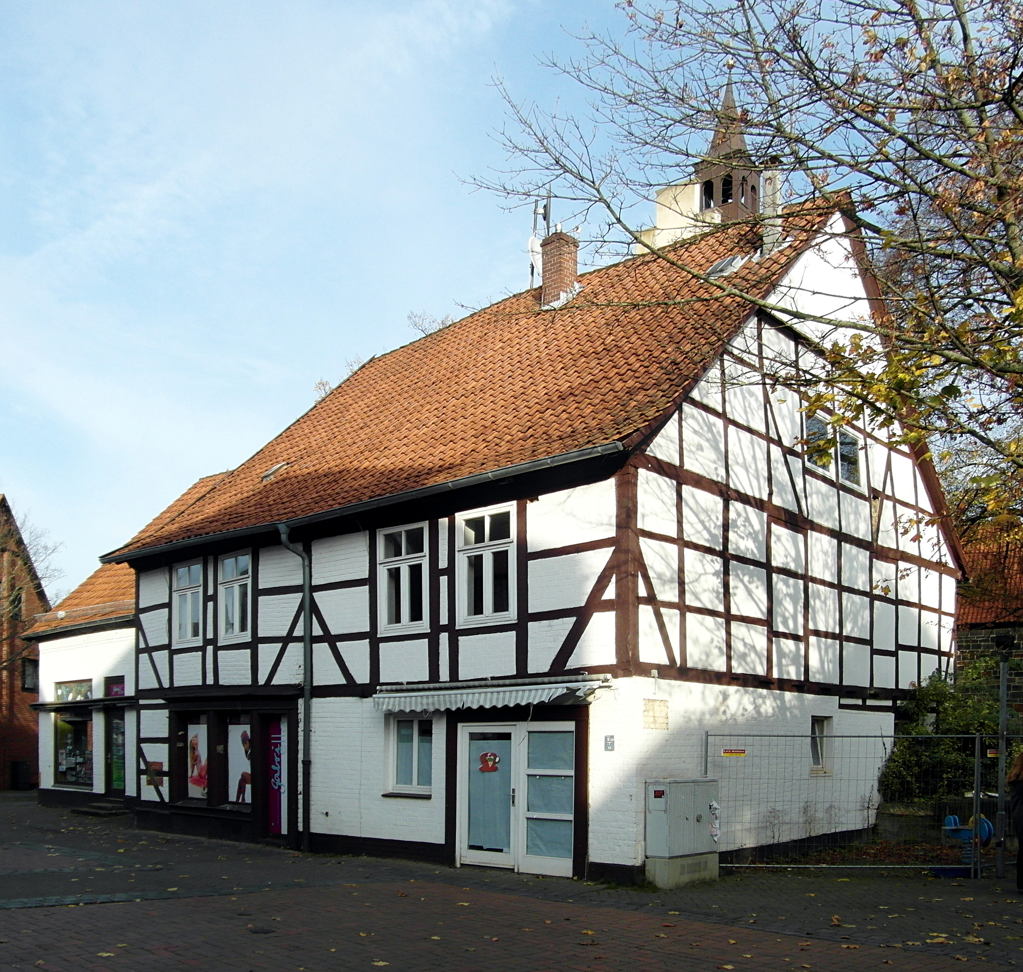 Das Geschäfts-/Wohnhaus mit Nebengebäude ist ein durch seine Lage und Gestaltung das Stadtbild prägendes 2-geschossiges Fachwerkgebäude mit 1-geschossigem Putz-Anbau